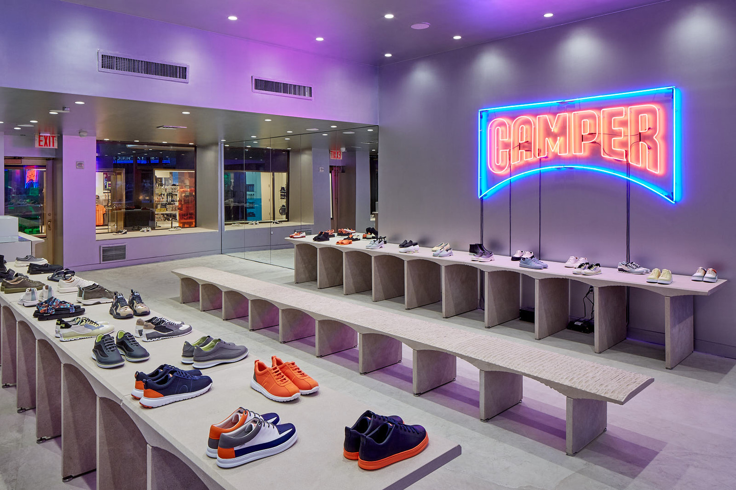 Tienda Camper en el centro comercial Rockefeller de Nueva York